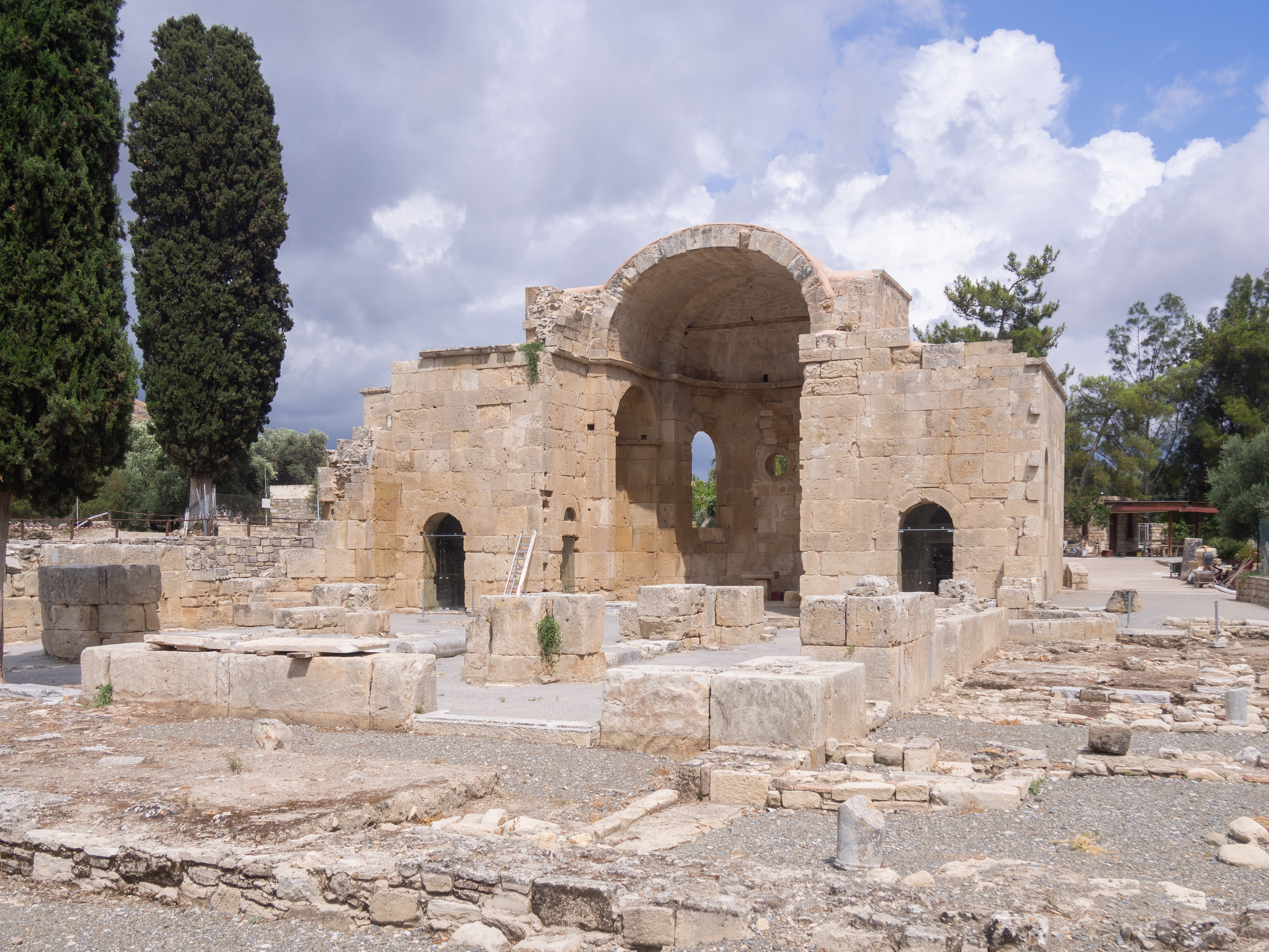 Ναός Αγίου Τίτου Γόρτυνας«Ναός Αγίου Τίτου Γόρτυνας»